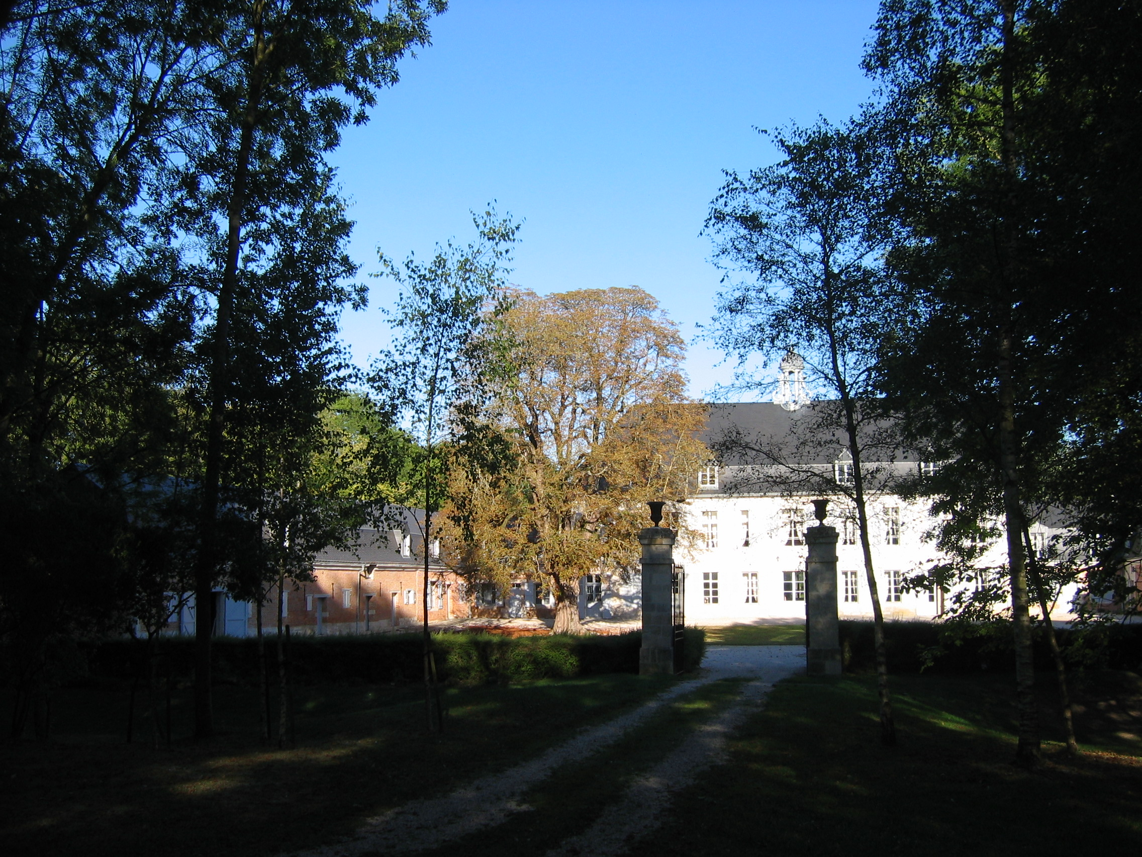 Château Arnicourt Ardennes France .